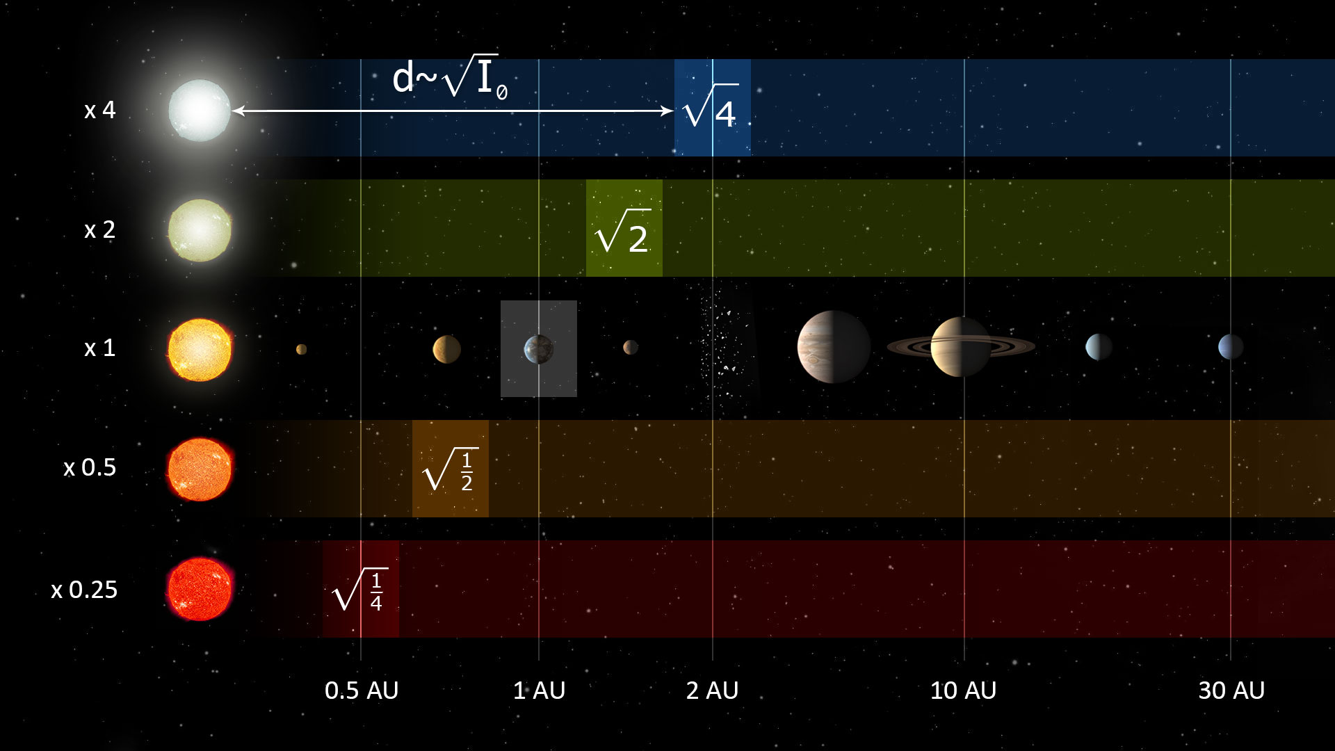 An example of a system, based on the stellar luminosity for predicting the location of the habitable zone around types of stars